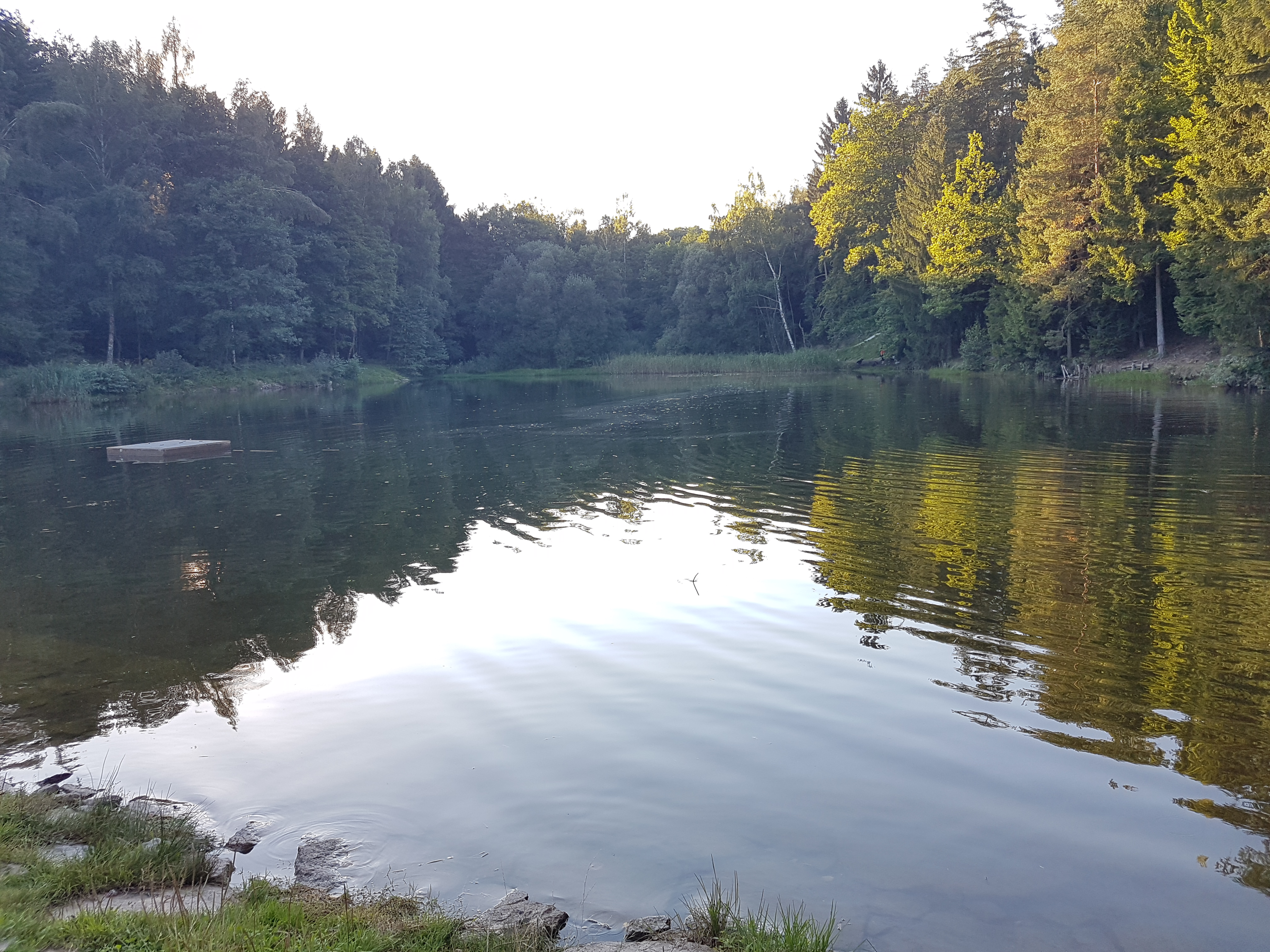 Der Silberbachstauweiher (Silberbachteich) staut den Silberbach auf. Er wurde um 1950 für den Wismutbergbau angelegt.